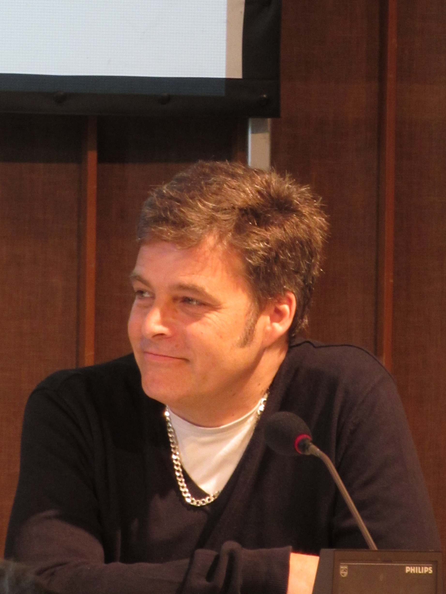 Andreas Rüttenauer auf dem taz.lab 2014 - «I love EU – Solidarität ist machbar» - Die taz baut ein neues Haus - Eine Veranstaltung der taz Genossenschaft: Präsentation und Gespräch mit taz-Geschäftsführer Kalle Ruch - Karl-Heinz Ruch, Ines Pohl, Hermann-Josef Tenhagen, Andreas Rüttenauer - Tag: 12.04.2014 - Anfang: 12:15 Uhr - Dauer: 00:50 - Raum: K1